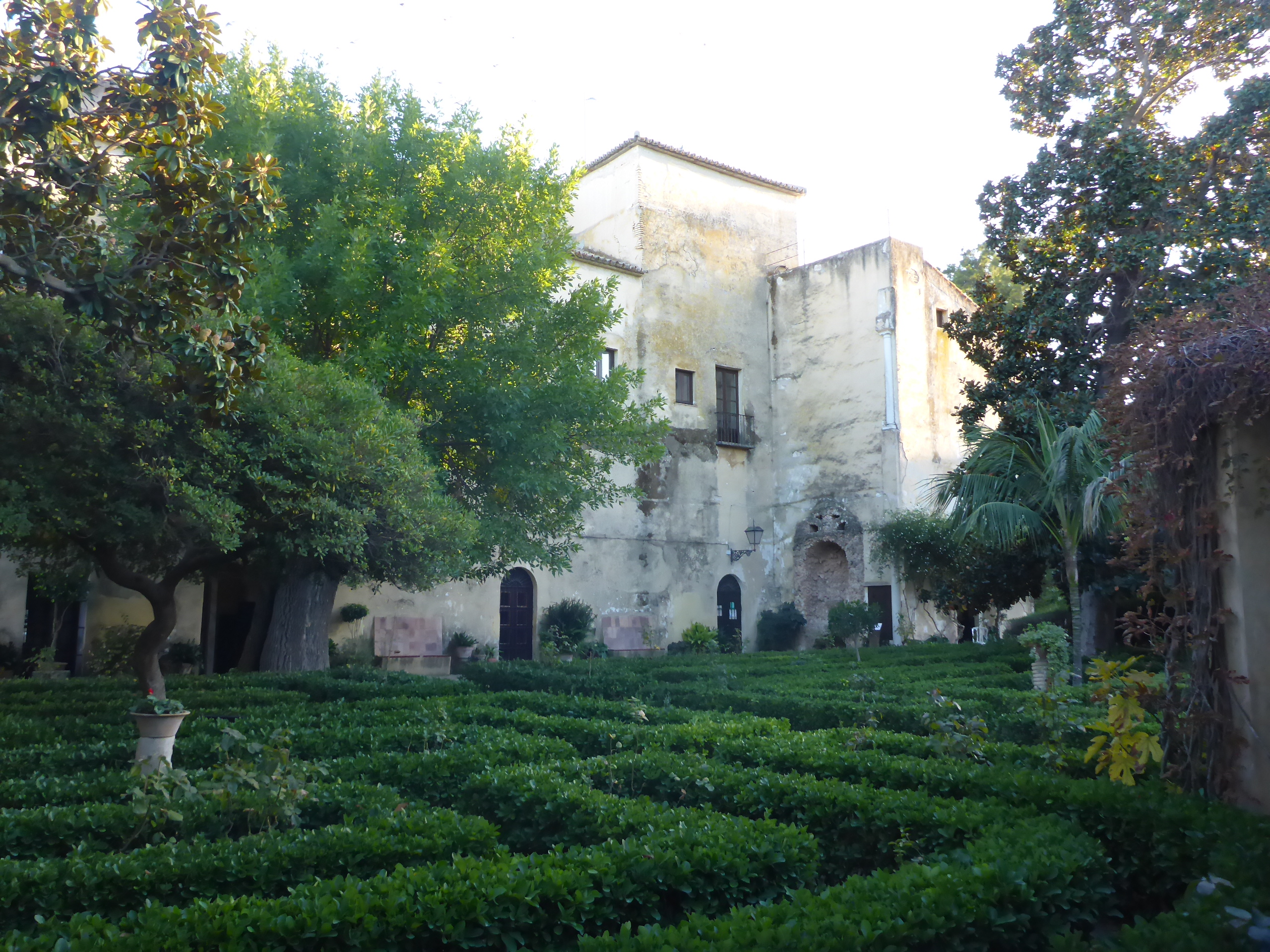 Jardines del Palacio de los Enríquez de Ribera (Bornos, España)